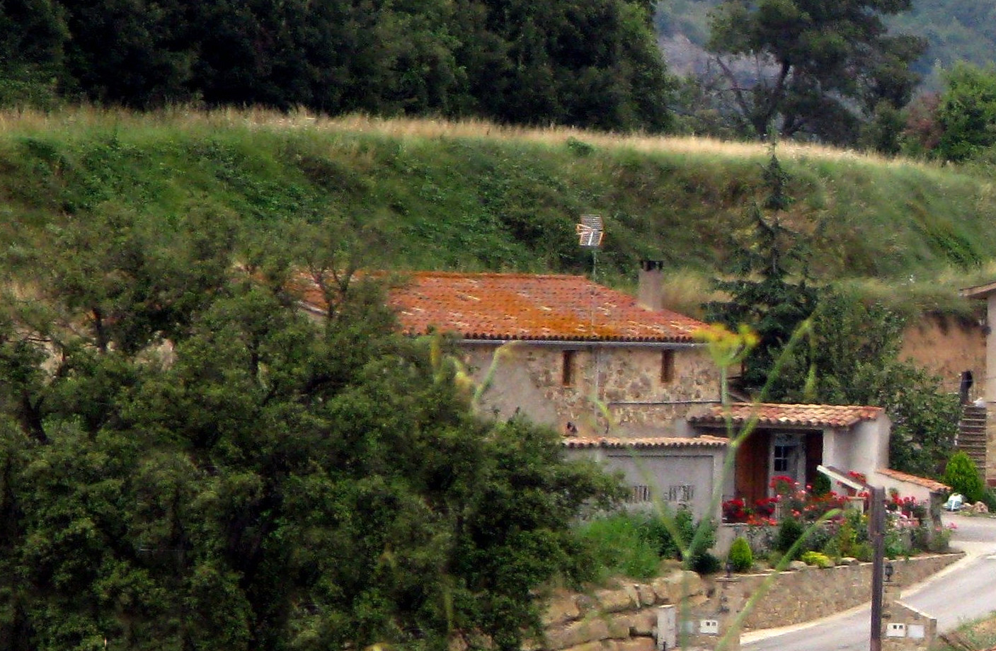 Masia origen de la urbanitzacio actual a qui dona nom. Sant Quirze Safaja